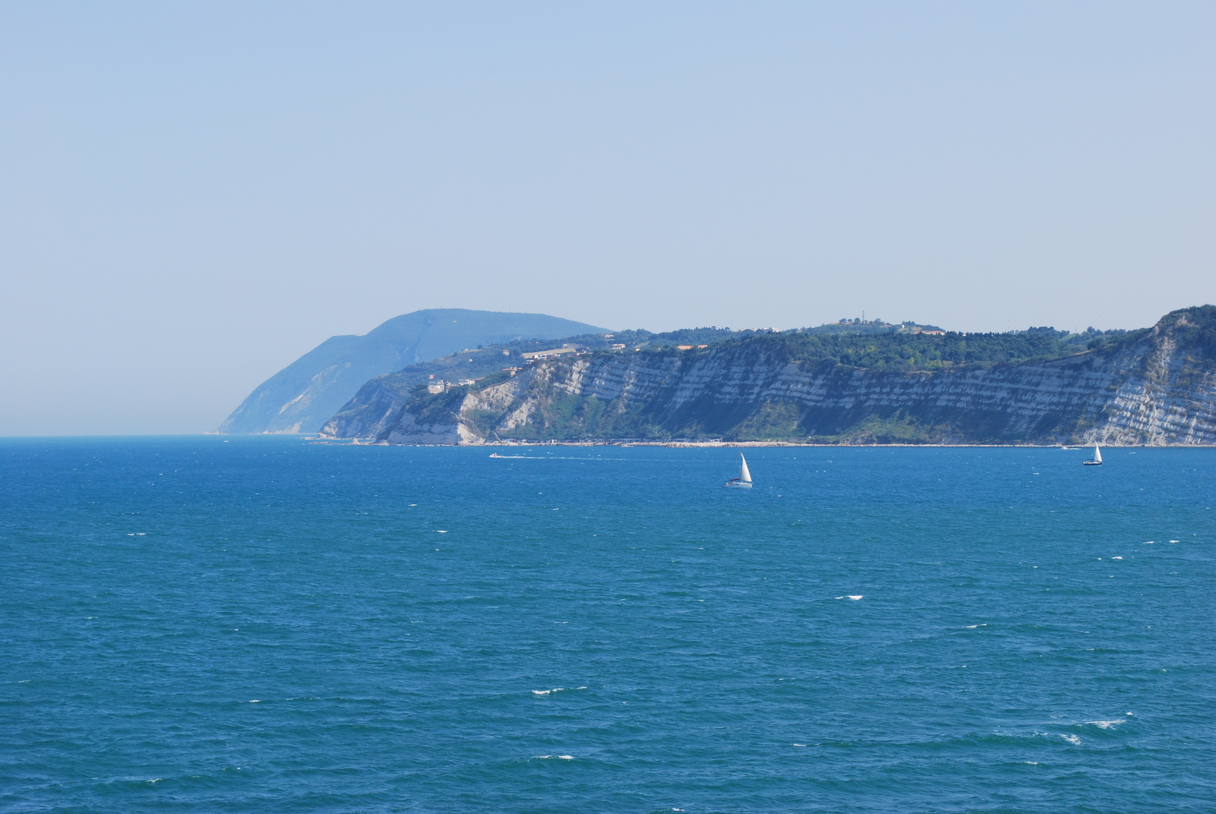 Vue depuis "Olympic Champion", de la compagnie maritime grecque ANEK, au large d'Ancône, en route vers Patras (Grèce).